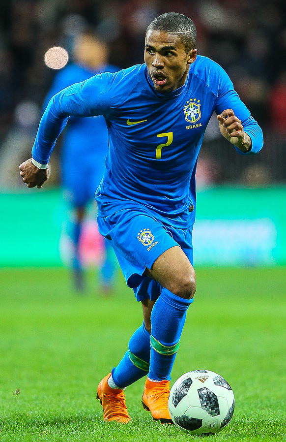 Россия проиграла Бразилии со счетом 0:3